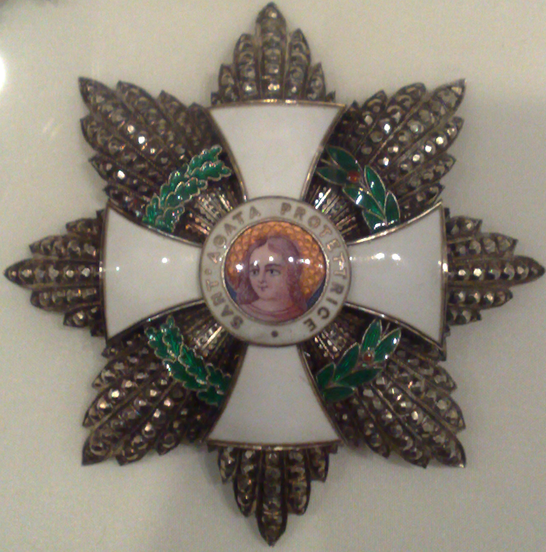 Agatha-Orden_Stern